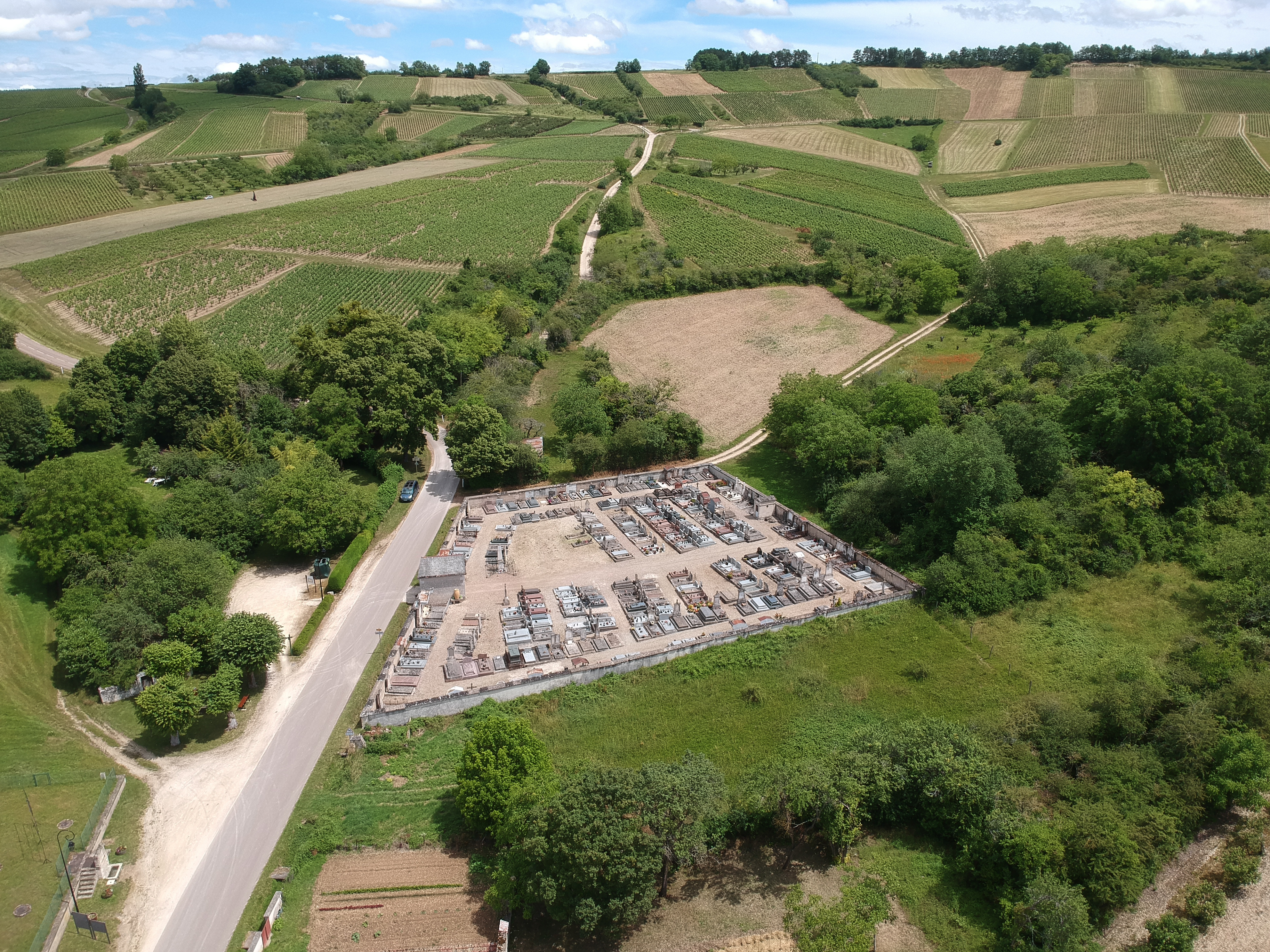 Cimetière d'Irancy (Yonne) depuis un drone.